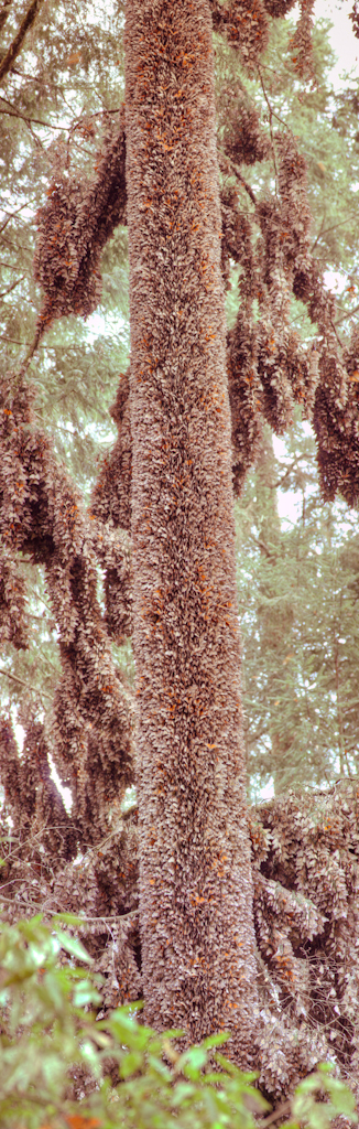 Mariposas Monarcas